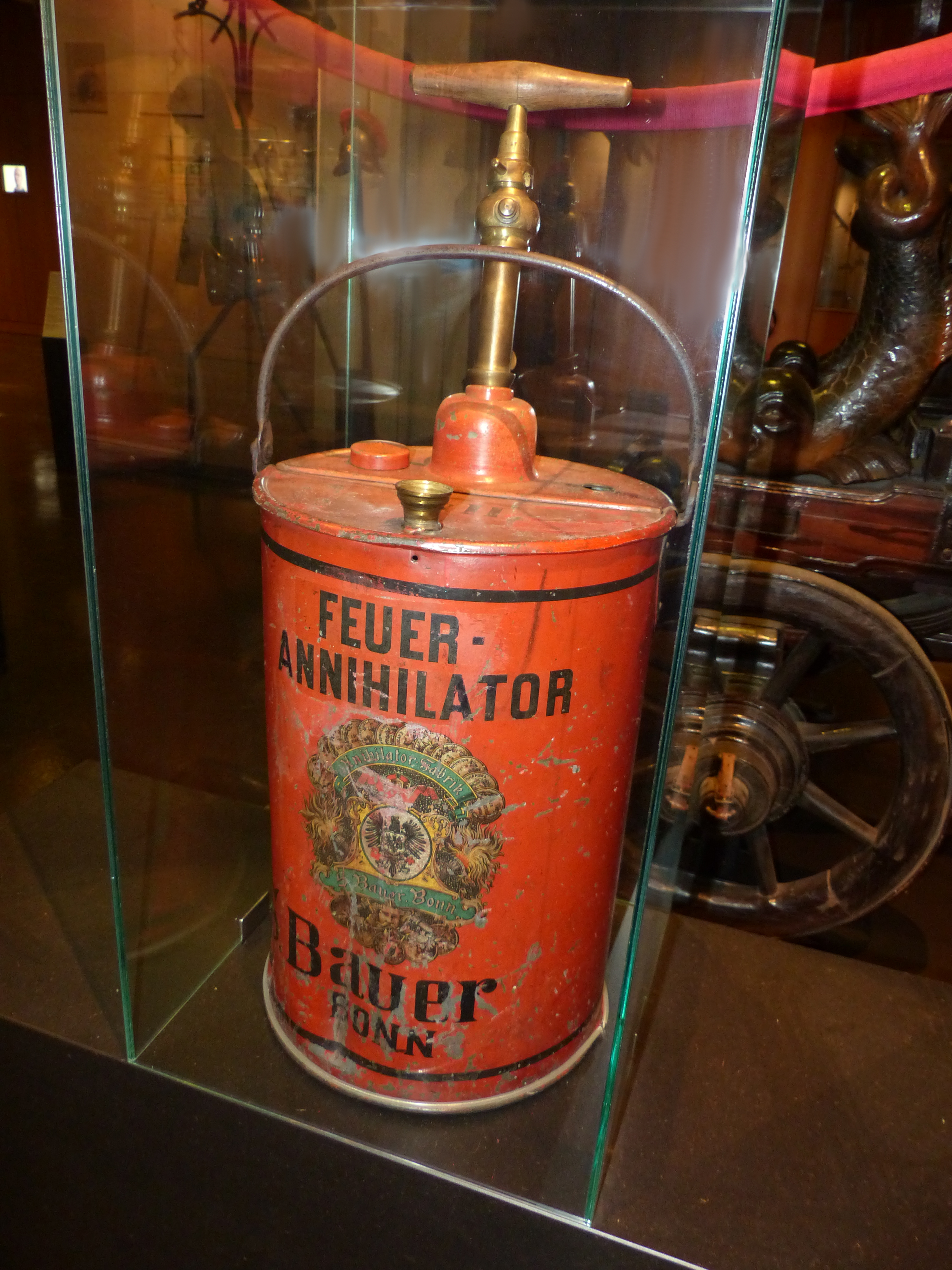 Feuer-Annihilator von Siegfried Bauer, Bonn, um 1885, Exponat in den Technischen Sammlungen Dresden